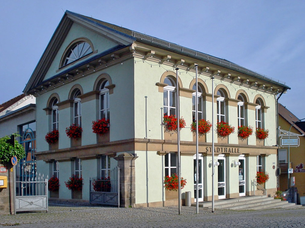 Stadt Eltmann, Landkreis Haßberge, Bayern